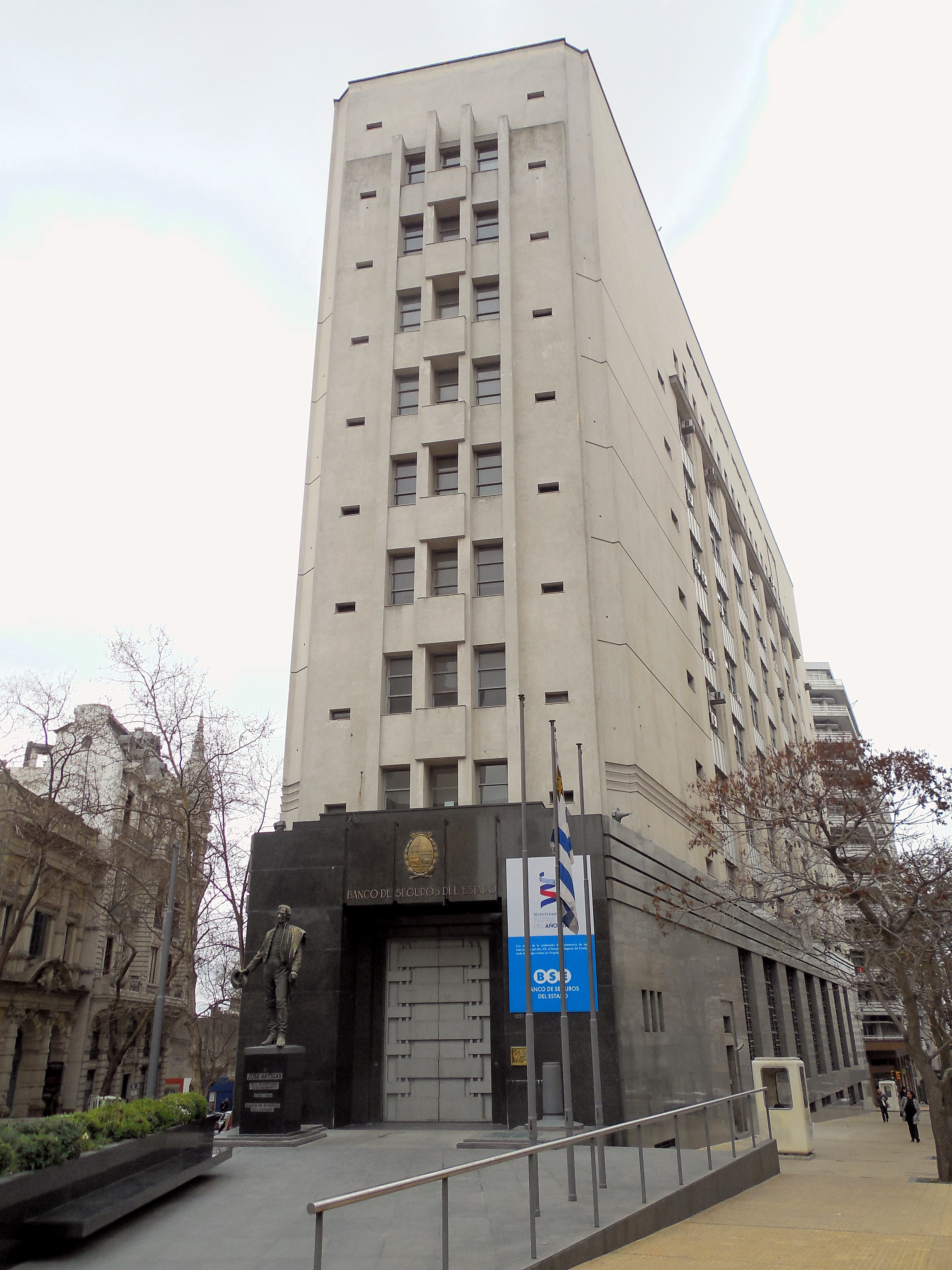 Sede central del Banco de Seguros del Estado. Ubicada en el departamento de Montevideo